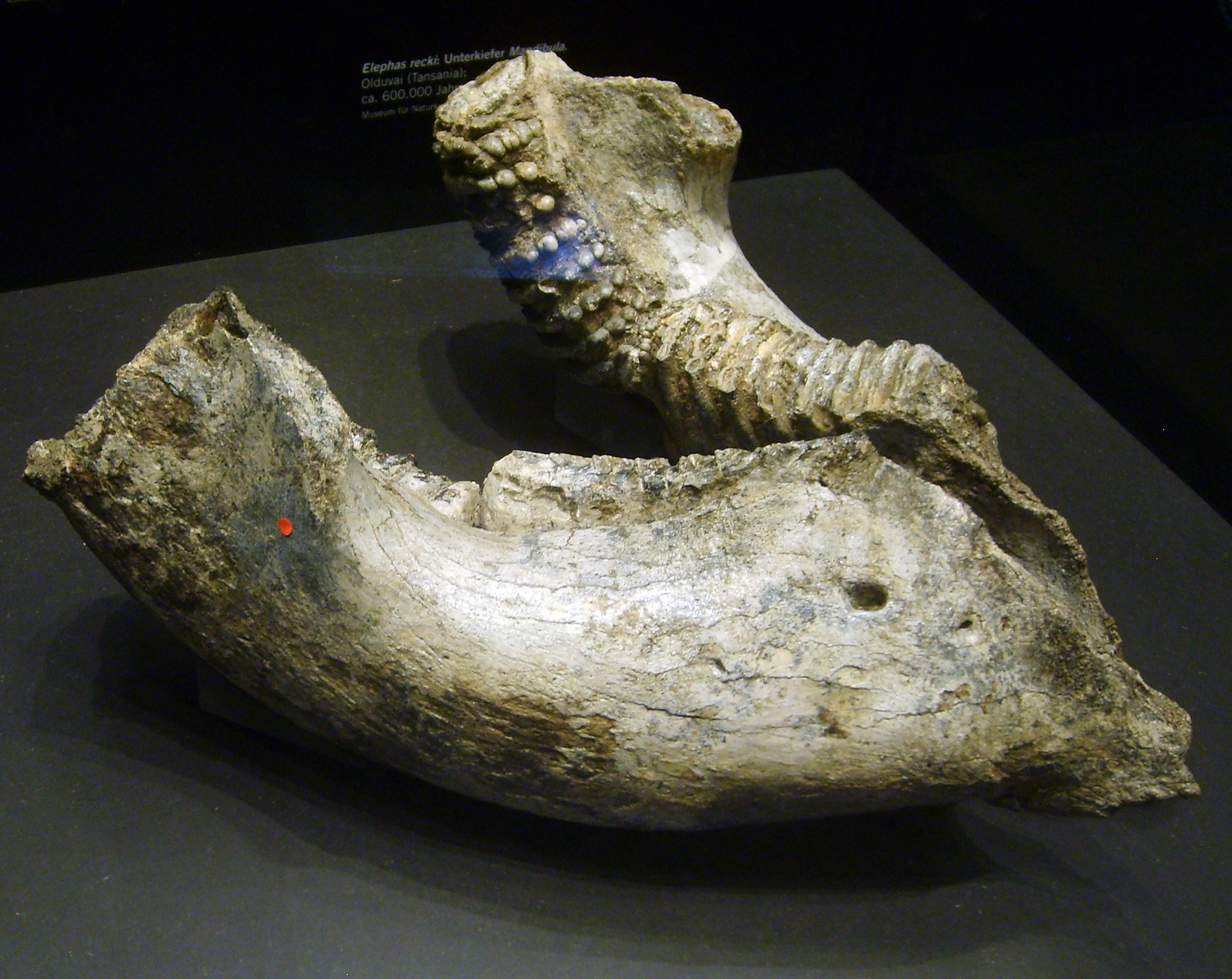 Elephas recki jaw, Naturkunde Museum, Berlin.